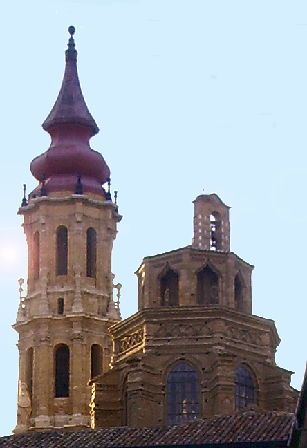 Torre y cimborrio de La Seo (Zaragoza)